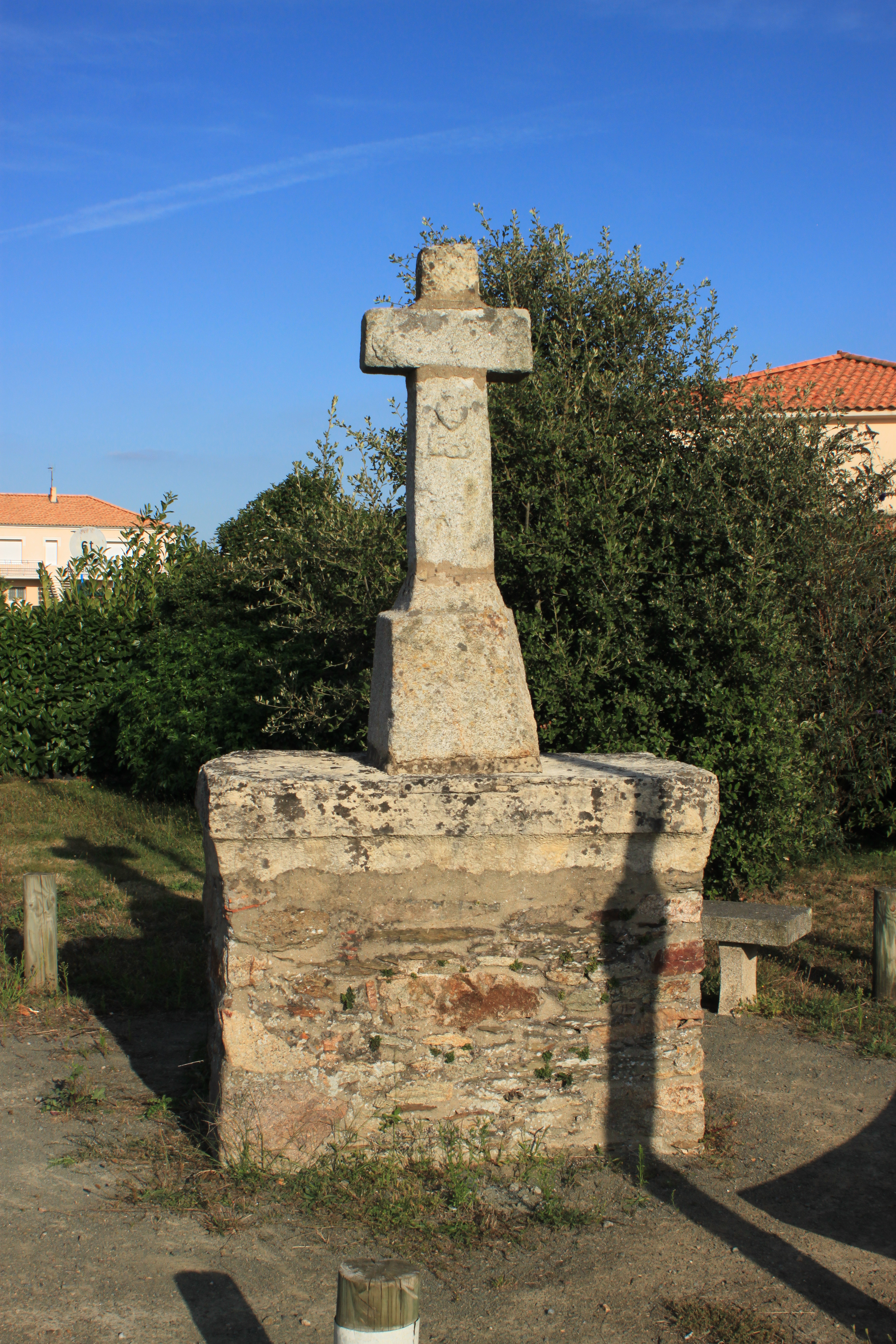 Croix de l'âne (XVI°), Fr-85-Vairé.